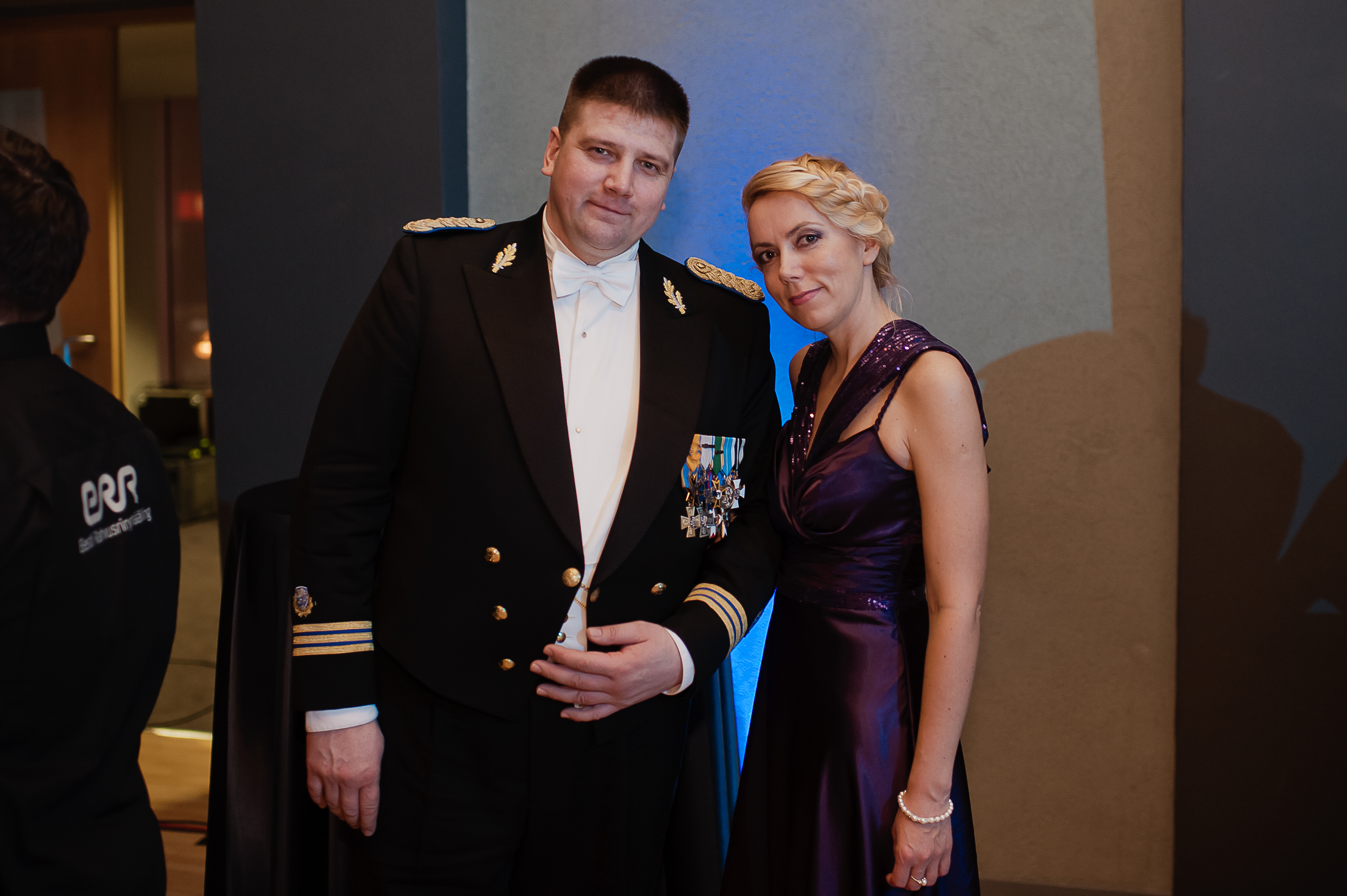 Politsei- ja Piirivalveameti peadirektor Raivo Küüt presidendi vastuvõtul.